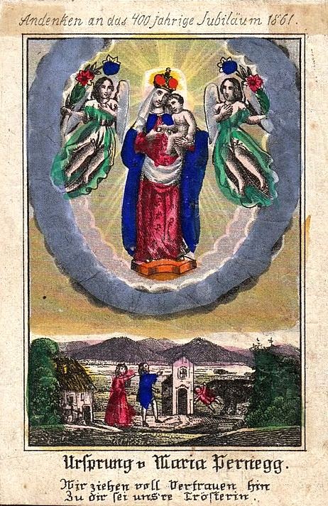 Pernegg an der Mur, Steiermark, Wallfahrtsandenken, 1861; kolorierter Stich